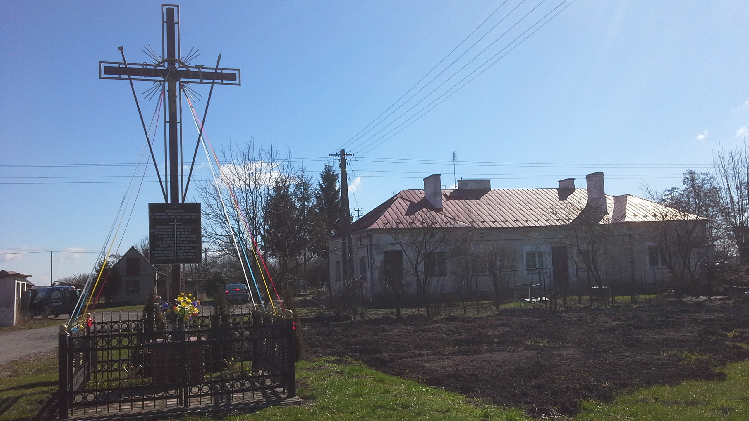 Dawna stacja kolejki wąskotorowej oraz pomnik kolejarzy zamordowanych przez UPA w Gozdowie